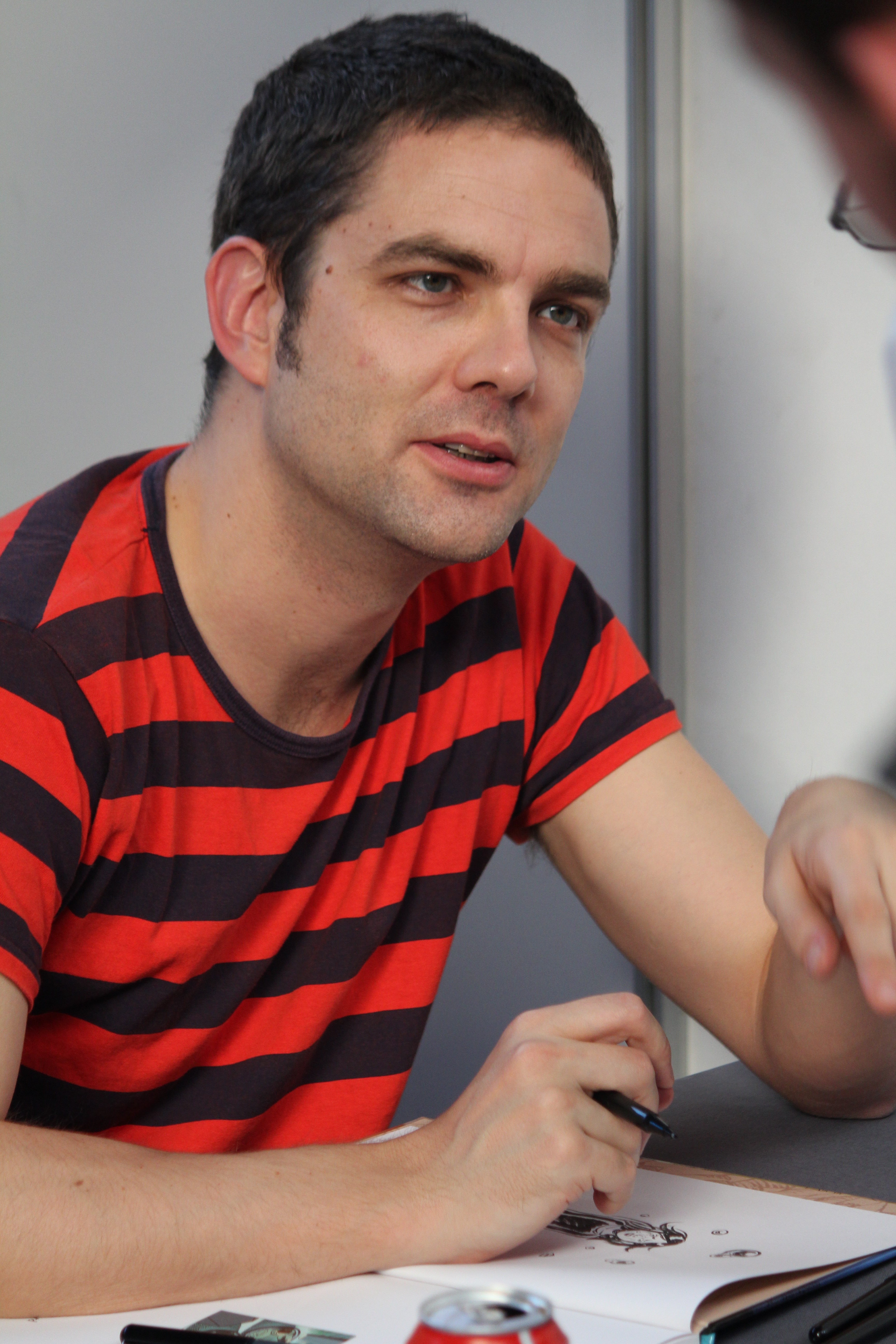 Frederik Peeters lors de Quai des Bulles à Saint-Malo le 27 octobre 2012.